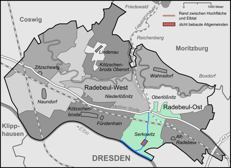 Karte der Stadtteile und Umlandgemeinden Radebeuls, hier Stadtteil Serkowitz